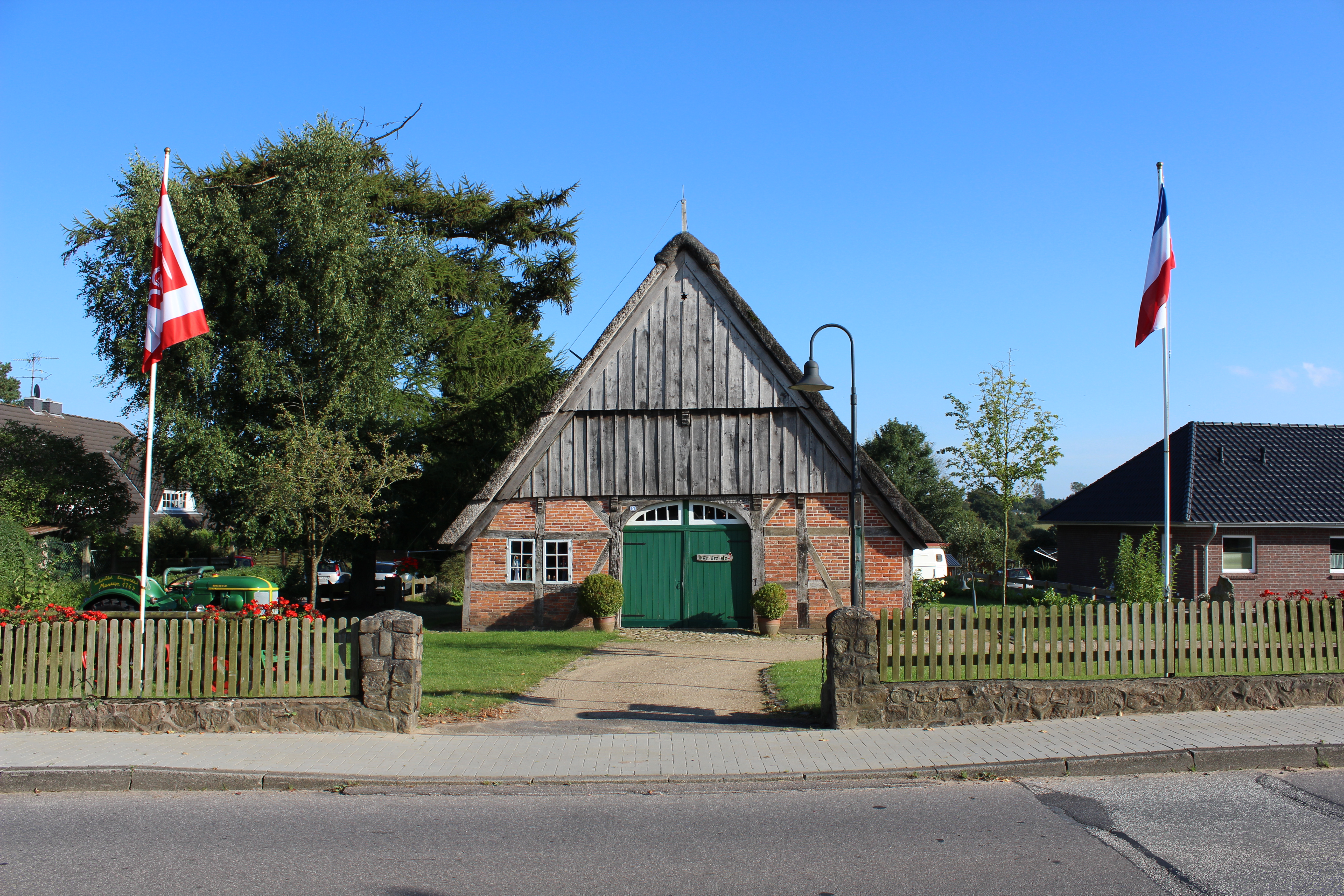 Schleswig-Holstein, Langwedel, Nortorfer Strasse 5, Schulkate